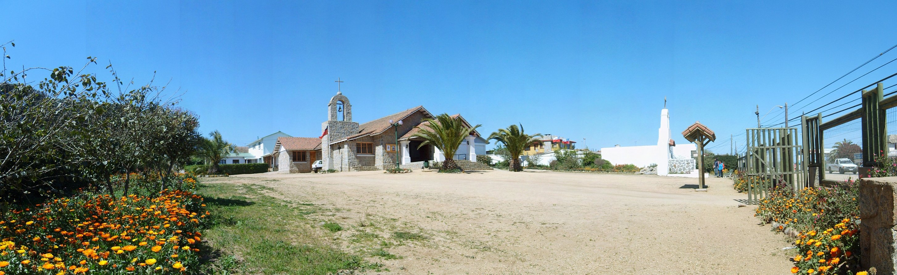 Iglesia de San Juan Evangelista en El Quisco, Región Valparaíso, Chile.